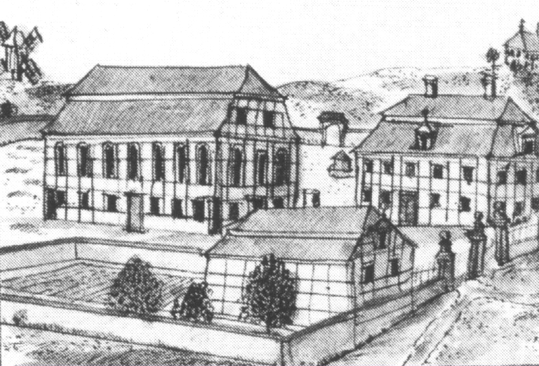 Gmina ewangelicka w Przemkowie (kościół, plebania i szkoła) ok. 1750. Rys. F. B. Werner, Topografia oder Prodromus Delineati Silesiae Ducatus, tom V, s. 250.